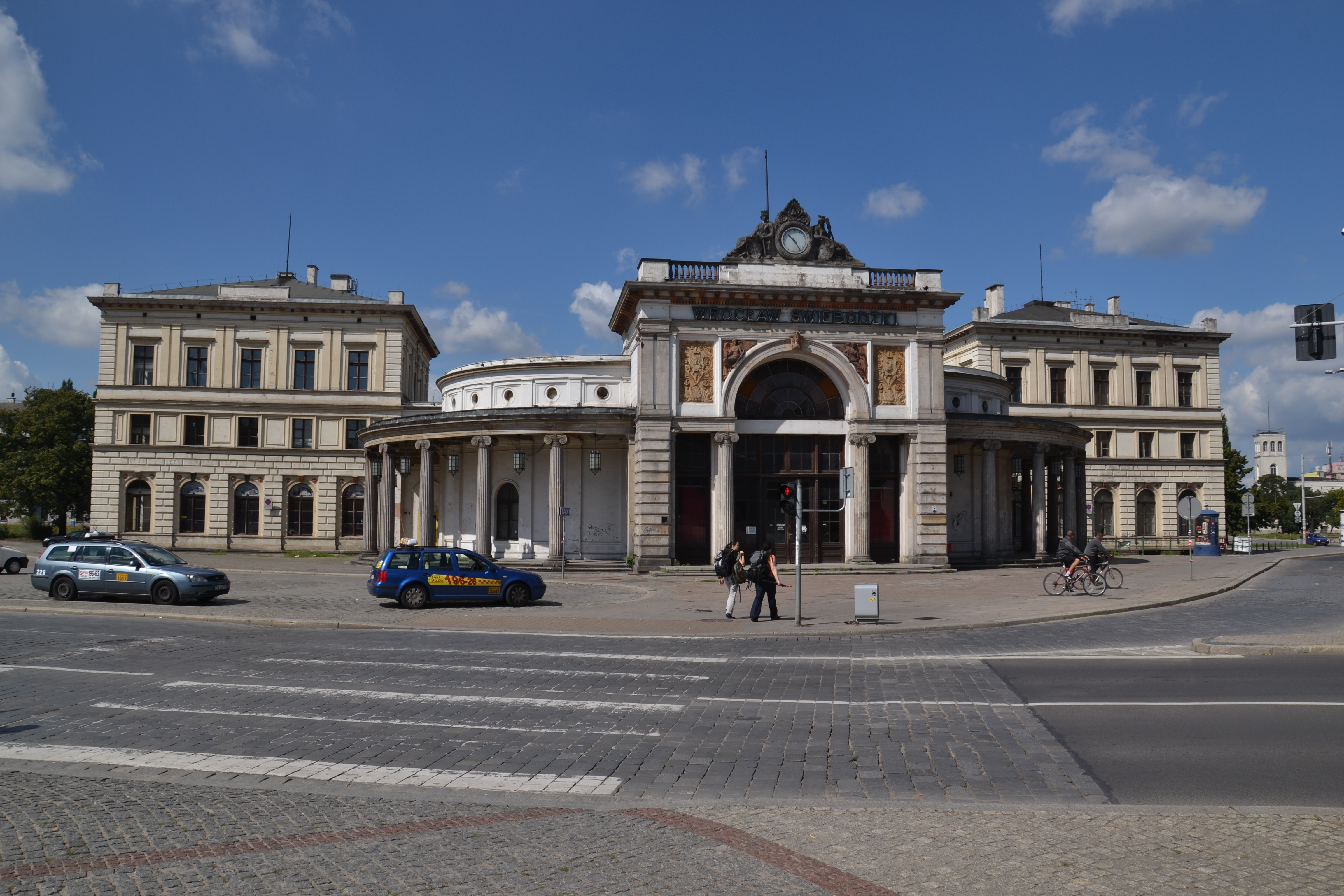 Widok od strony miasta na dworzec Wrocław Świebodzki